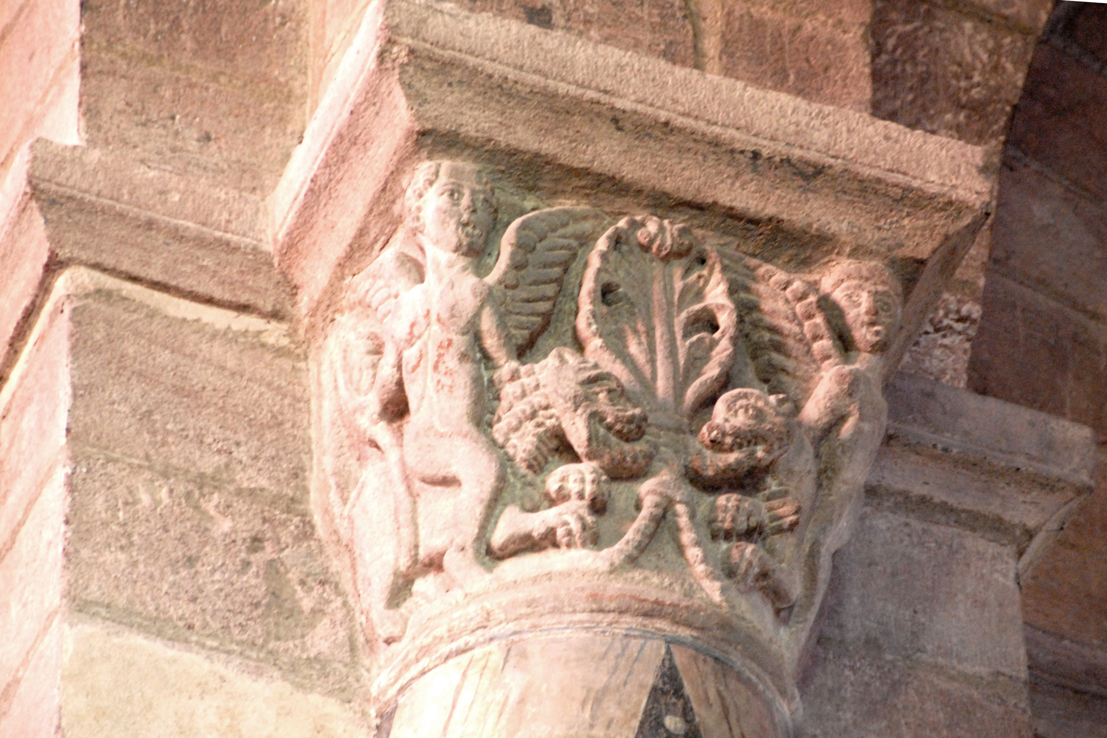 St.-Julien Brioude, Kapitell, Engel reiten auf Monstren die Ranken fressen